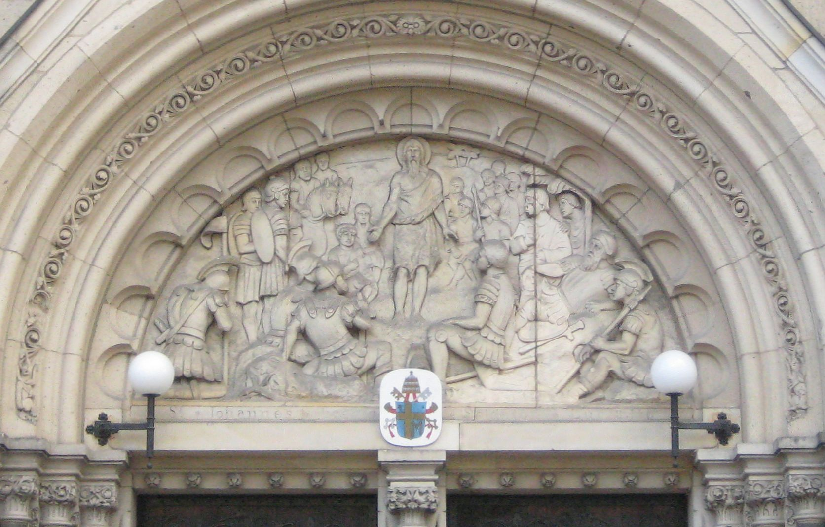 tympanum at Johannes-Basilika in Berlin-Neukölln